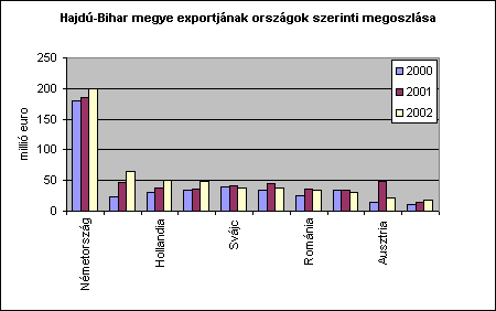 Hajdú-Bihar megye exportja